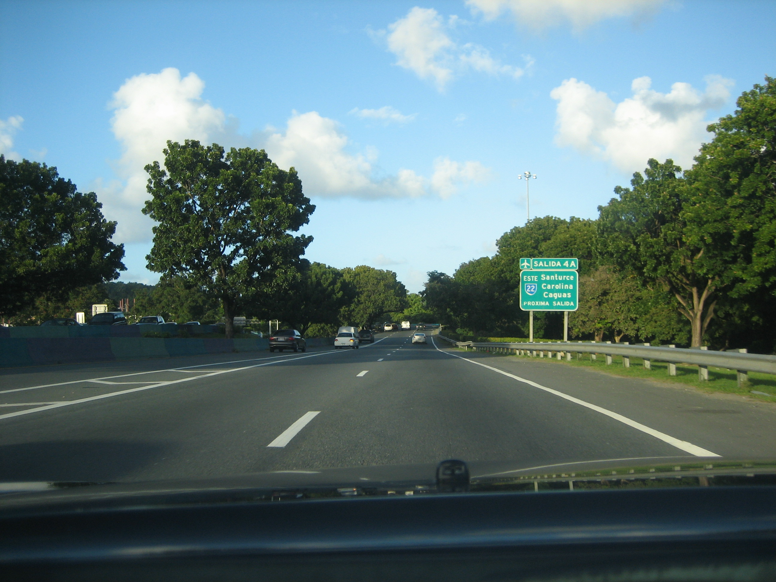 Carretera 2